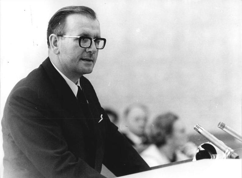 Zentralbild Koard-16.5.1969 Berlin: Bedeutsame 17. Sitzung des Staatsrates der DDR im Amtssitz am Marx-Engels-Platz. Im Amtssitz des Staatsrates am Marx-Engels-Platz: In der Diskussion sprach der Schauspieler Günther Simon vom Hineinwachsen des Künstlers in die sozialistische Menschengemeinschaft und von der Wirkung des Kunstwerkes in ihr.